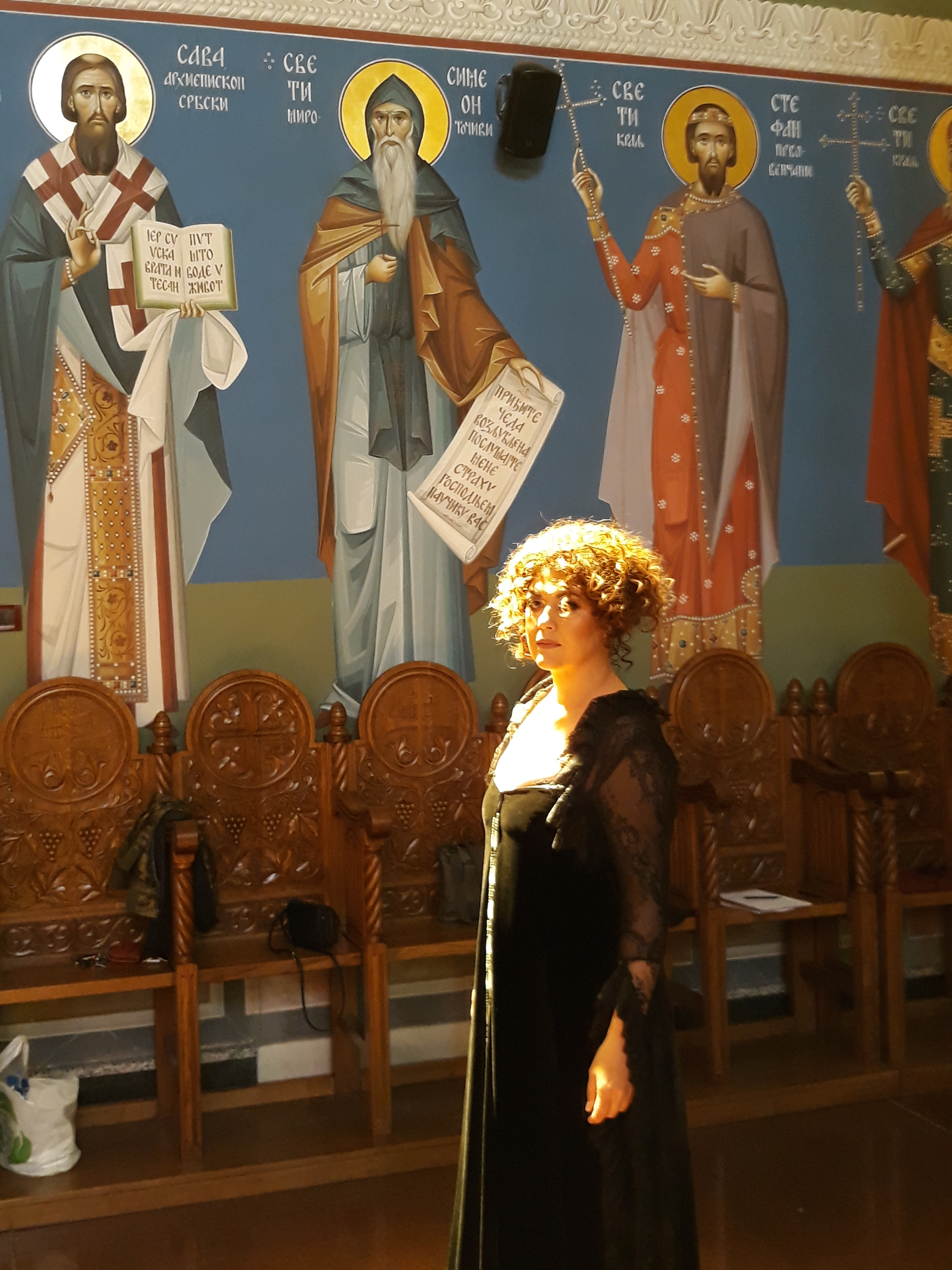 Дивна ЉУбојевић у манастиру Ваведење Пресвете Богородице у Београду, 2020.